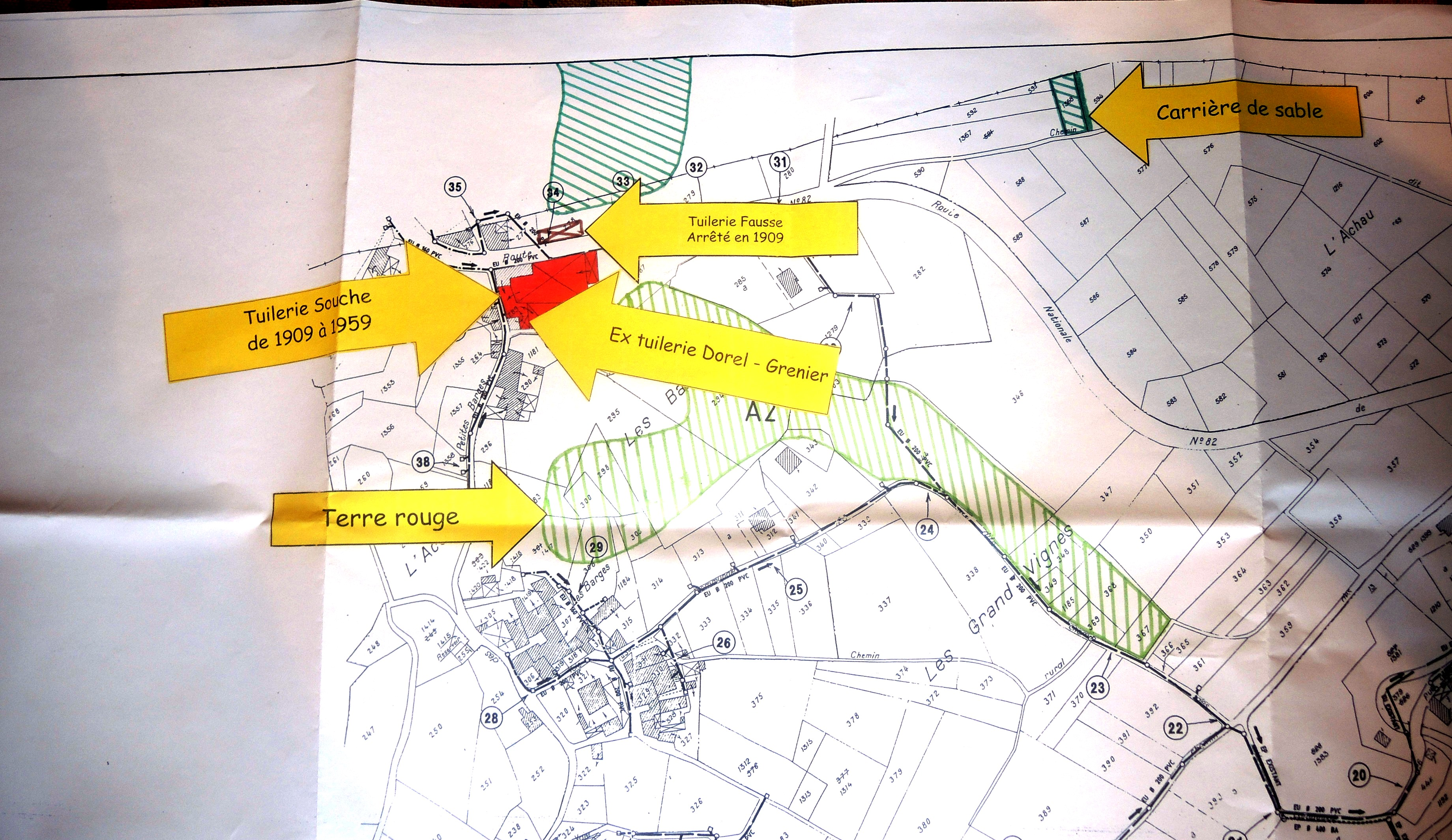 Saint-Etienne-de-Valoux détail